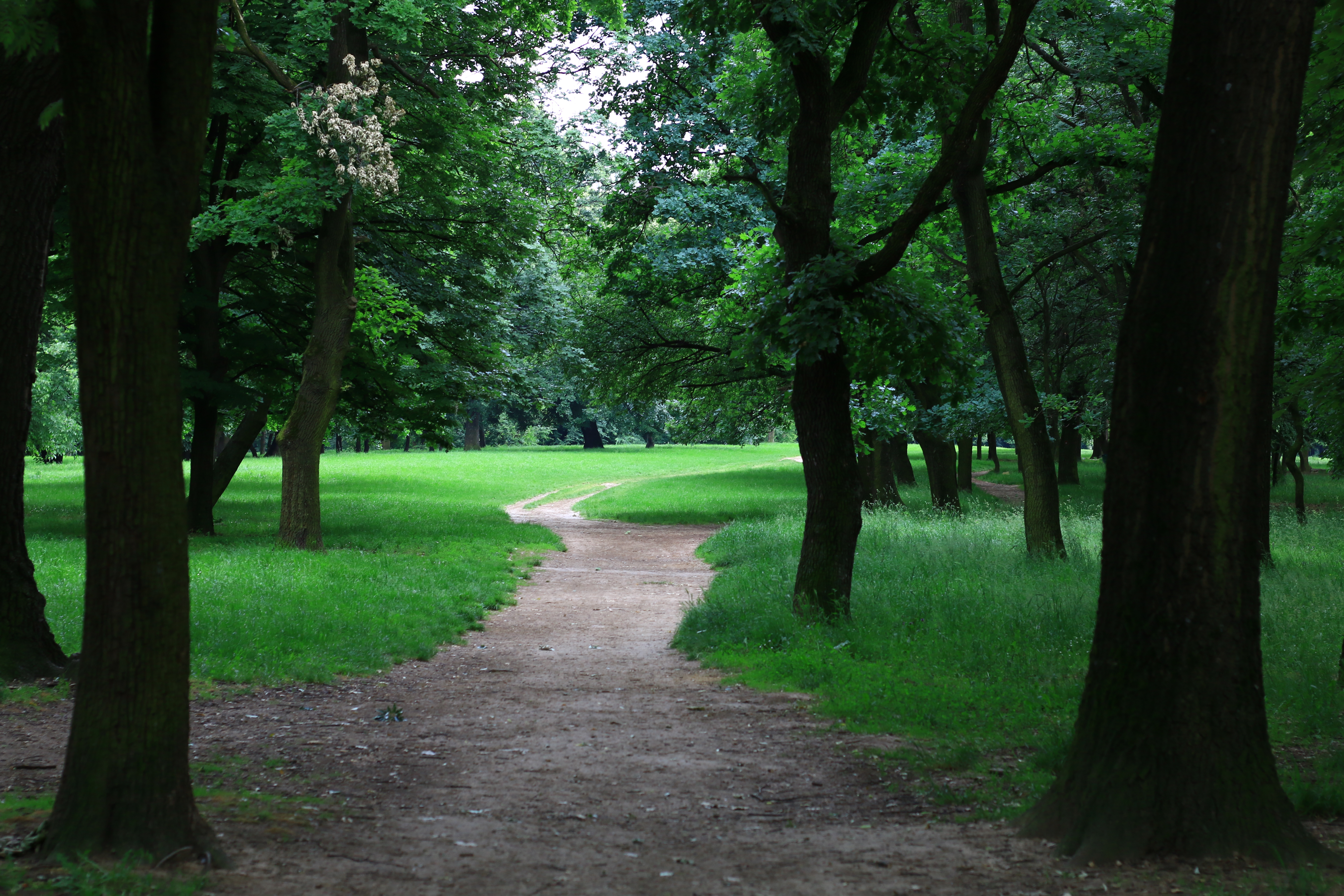 Ово је фотографија заштићеног природног добра у Србији под шифром: П036 This is a a photo of a natural area in Serbia with ID: П036 Spomenik prirode Šuma Košutnjak